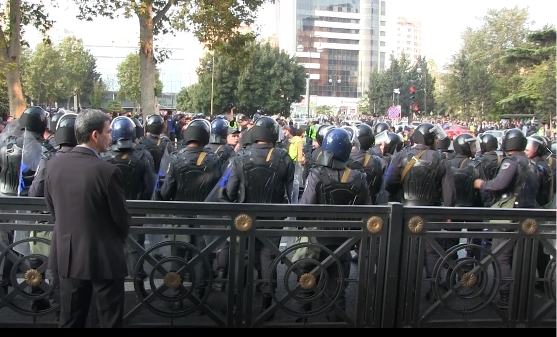 19 oktyabr mitinqi (Bakı)